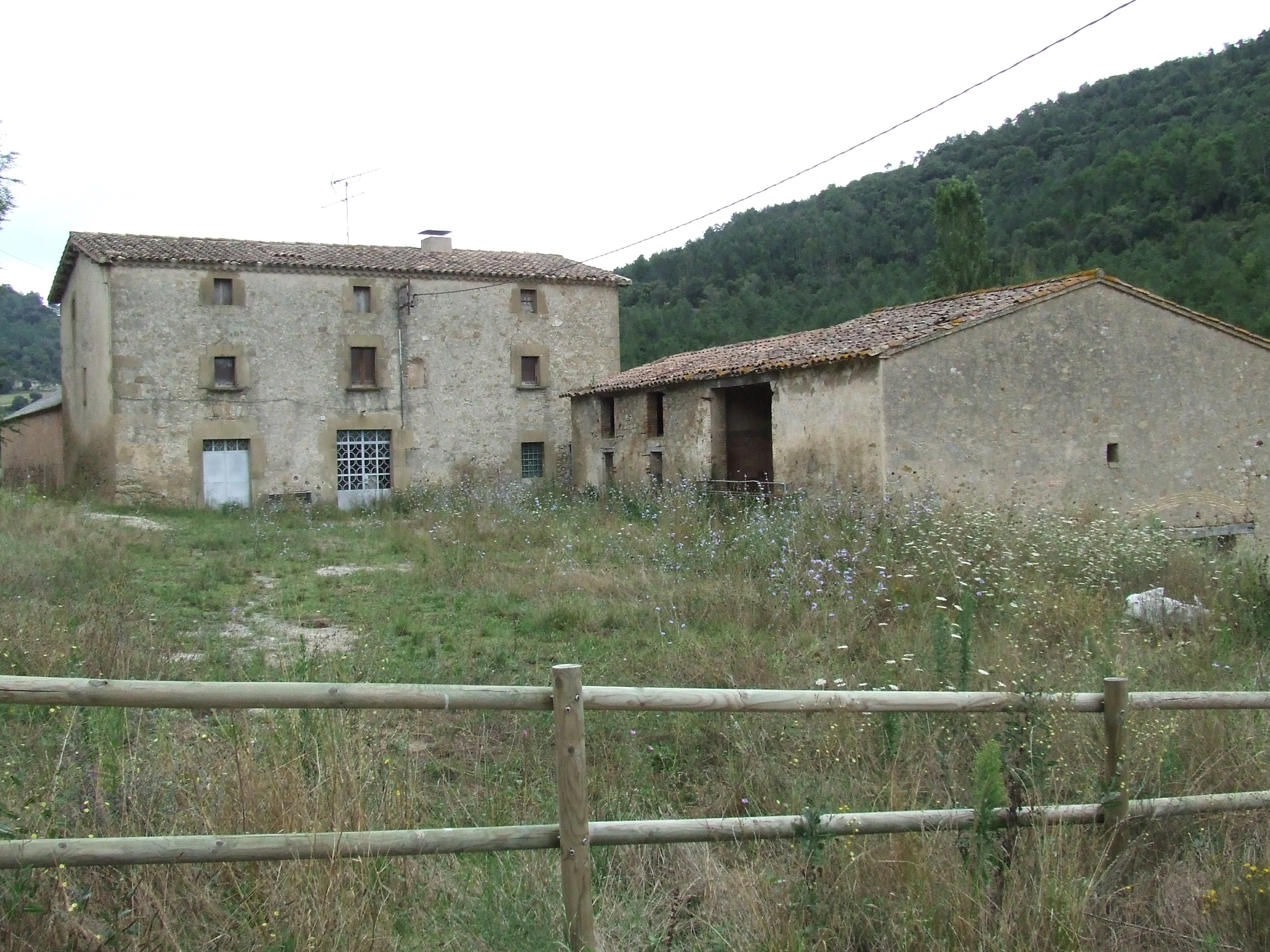 Ca l'Antoja (Castellcir, Moianès)